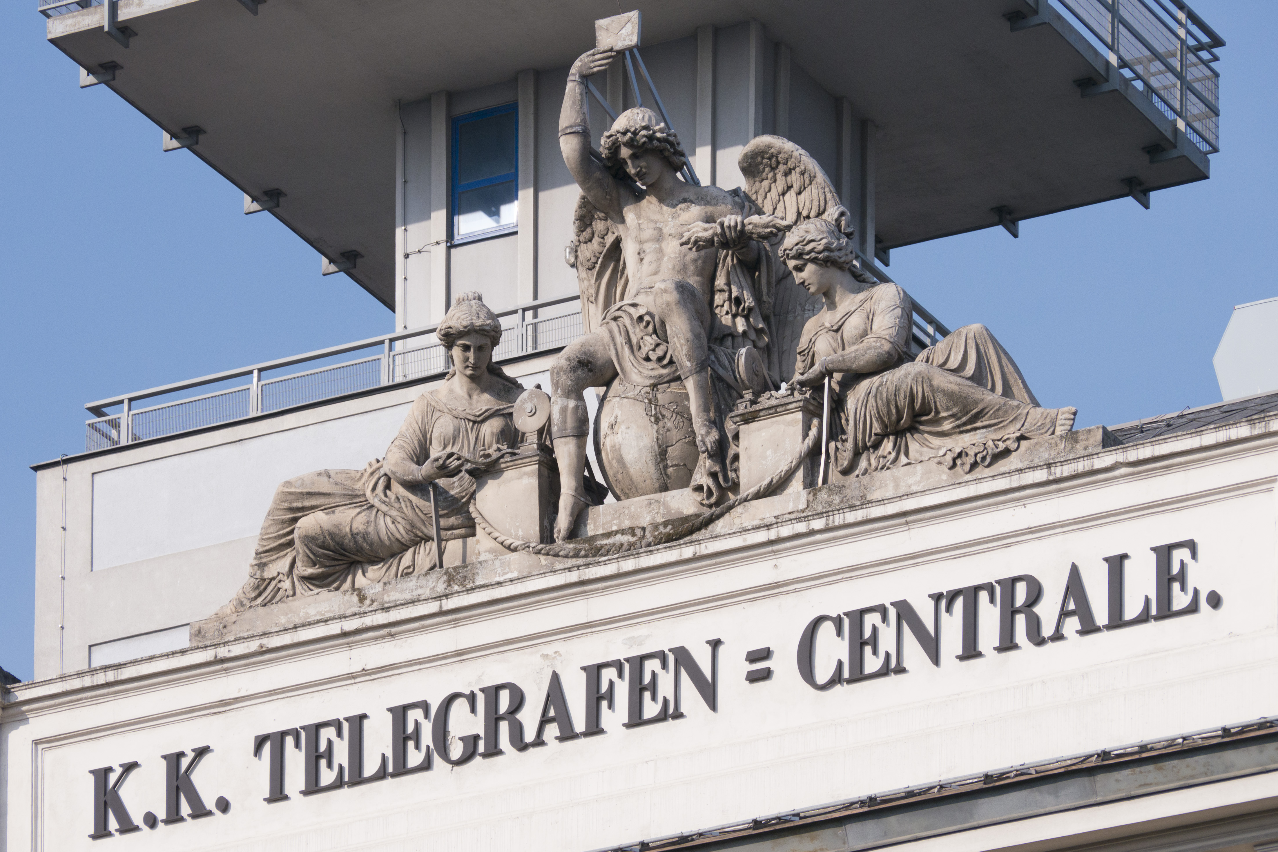 Telegraphenzentrale